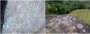 Petroglifos de cantón Zaruma